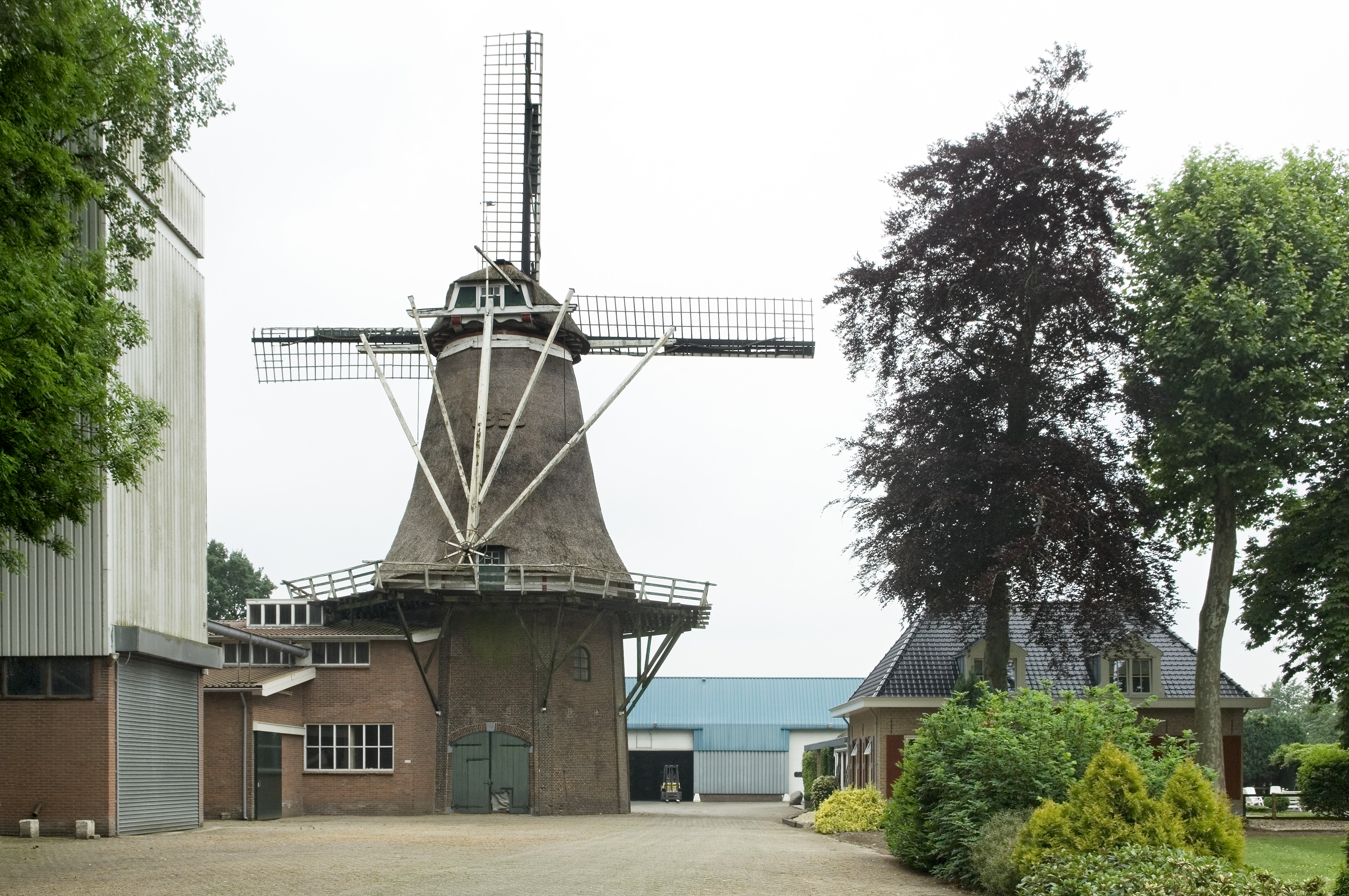 Korenmolen "De Hoop": Overzicht van de molen (opmerking: Project RRWR)